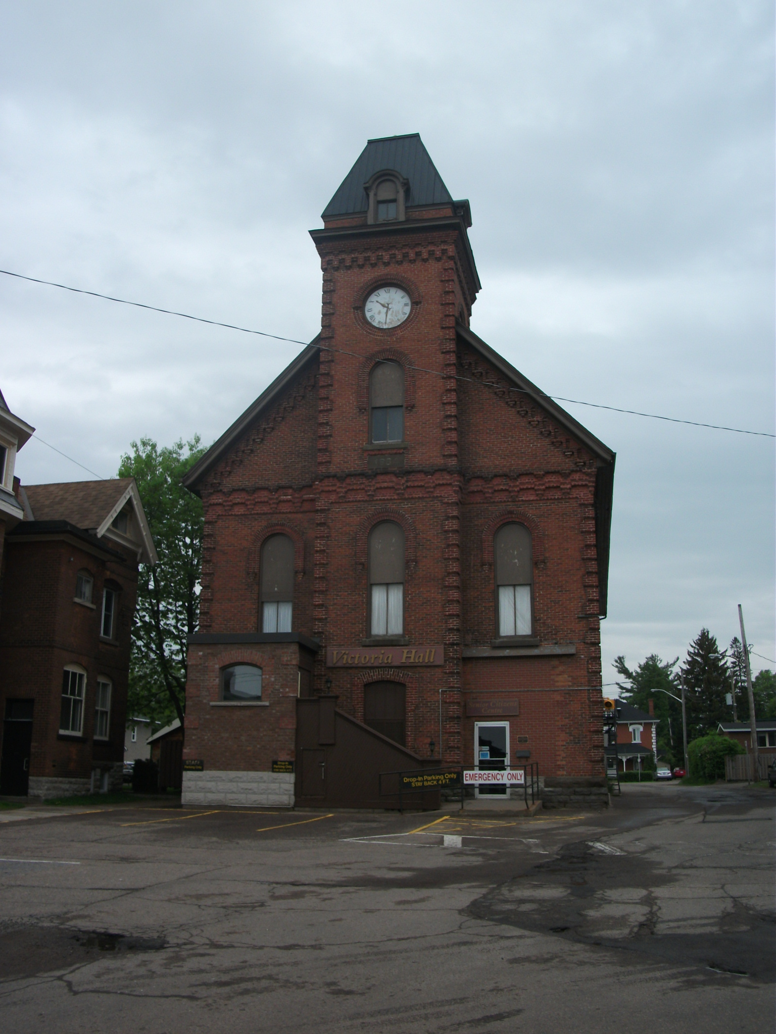 Pembroke, Ontario